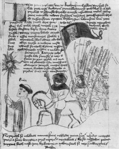 Jan Žižka v čele husitských vojsk